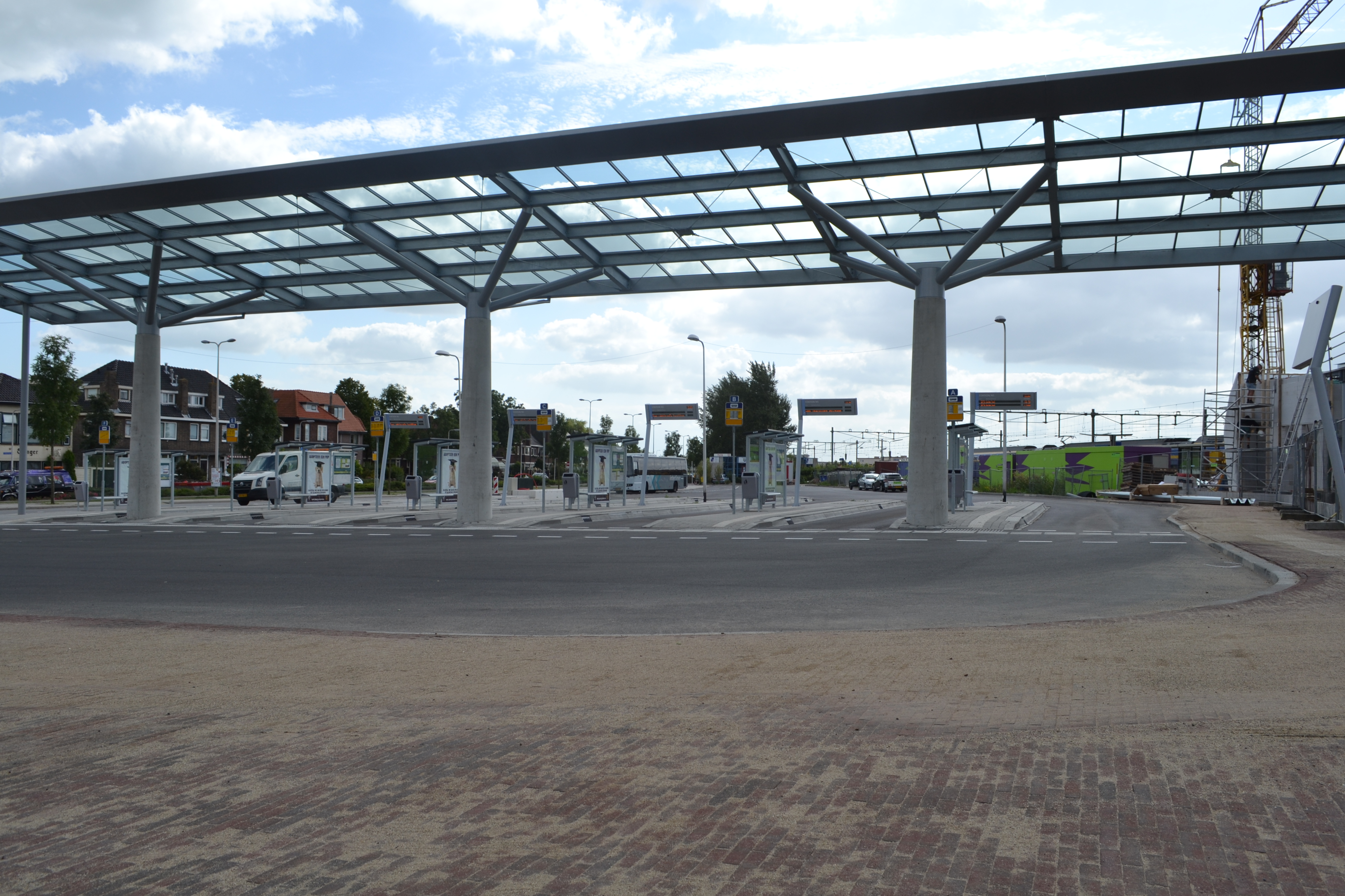 Het busstation van het station Alphen aan den Rijn. Het werd geoepnd op 26 augustus 2012.